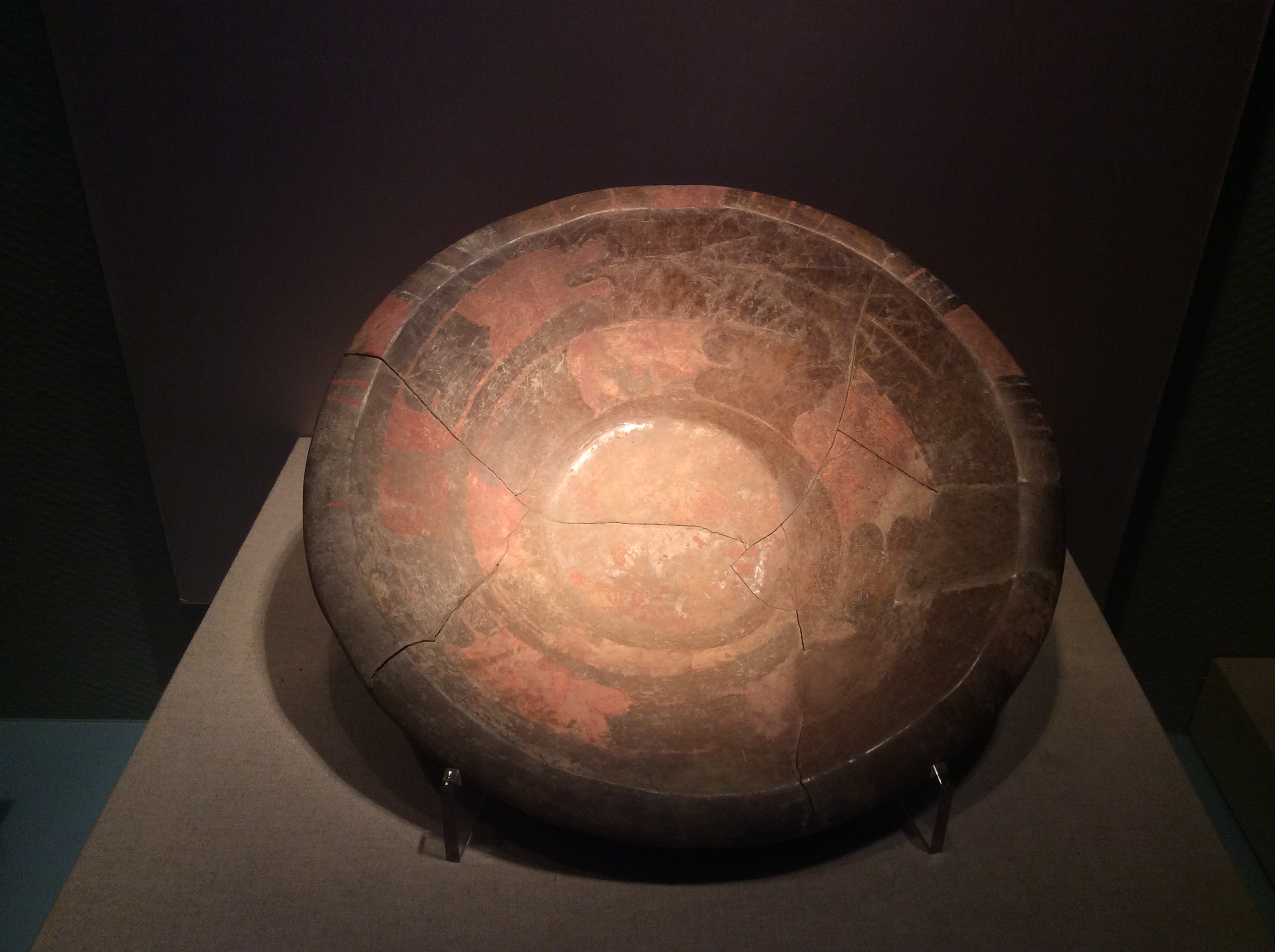 山西博物院藏彩繪龍盤